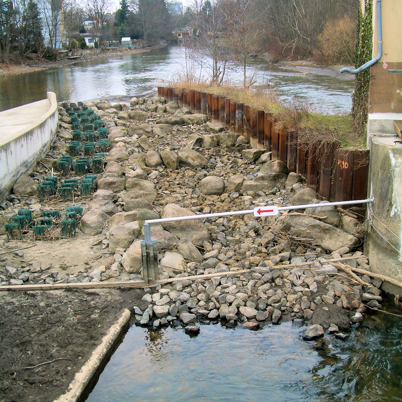 Kanupass (links) und Fischpass (rechts) und am Eisenbütteler Wehr bei abgelassenem Oberwasser.